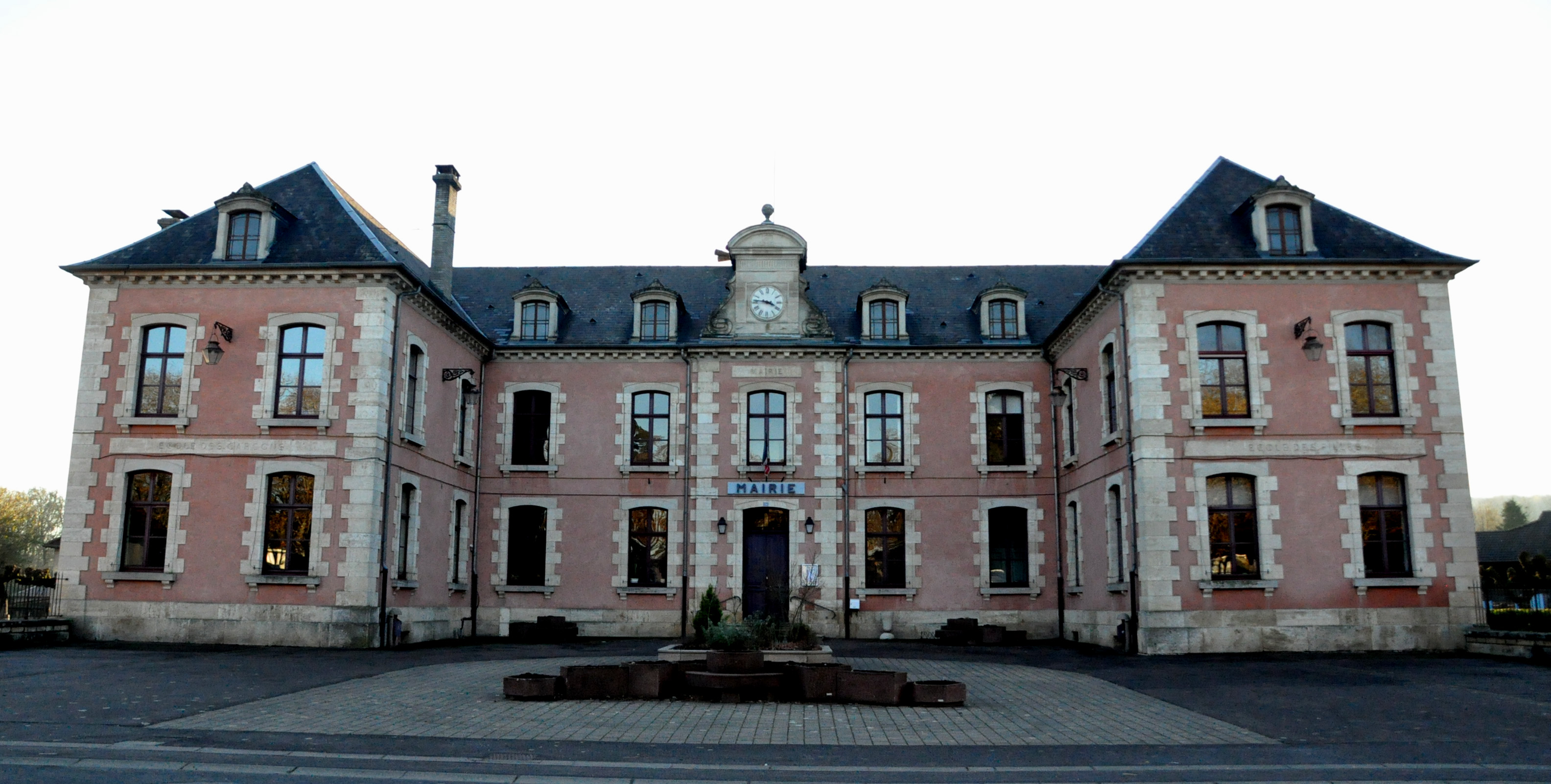 Mairie, justice de paix et école .